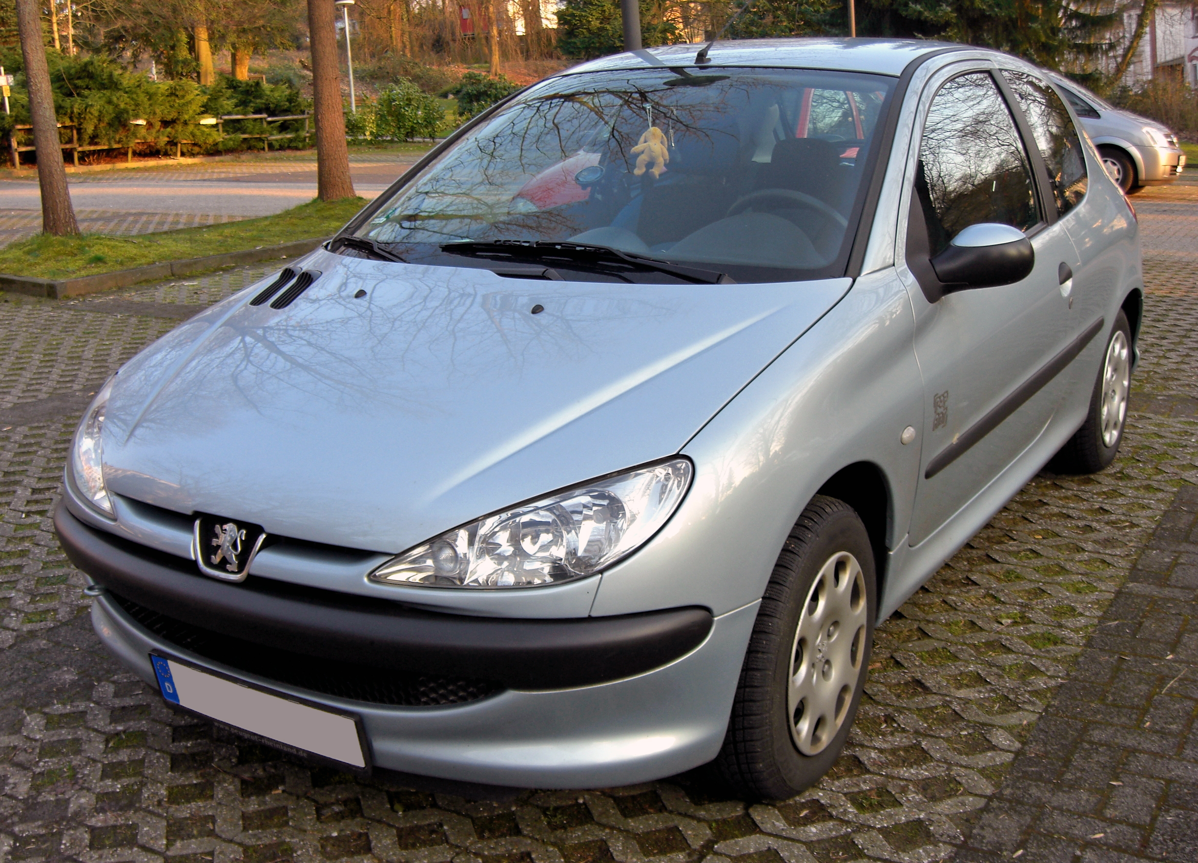 Peugeot 206